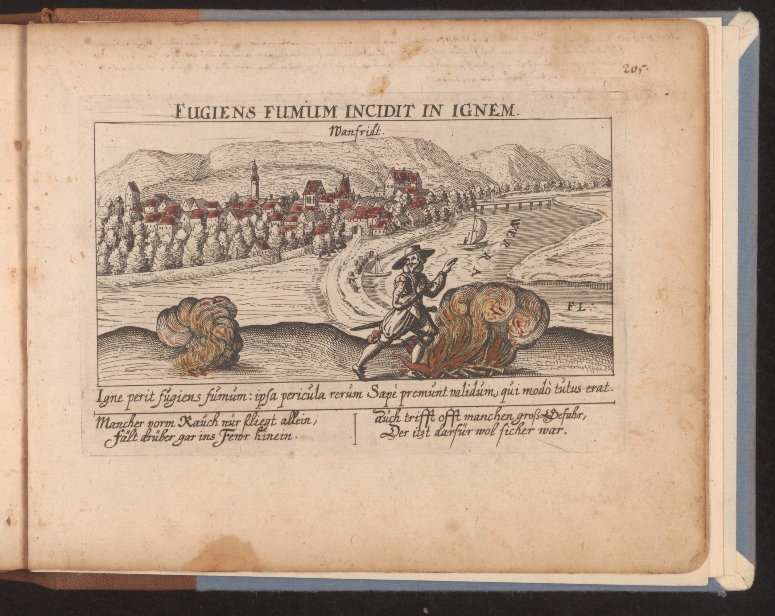 Kupferstich von Wanfried aus der Werkstatt von Eberhard Kieser.